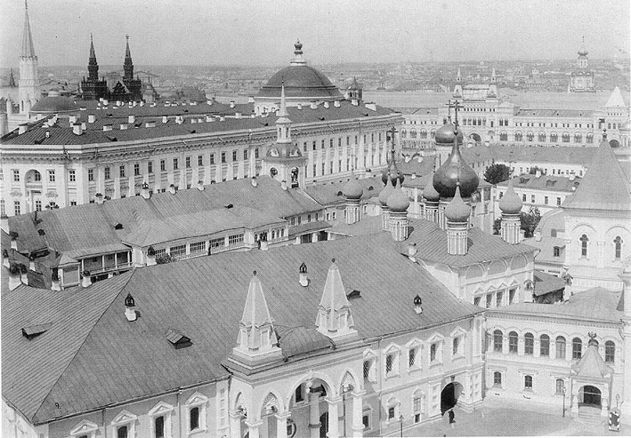 Chudov Monastery